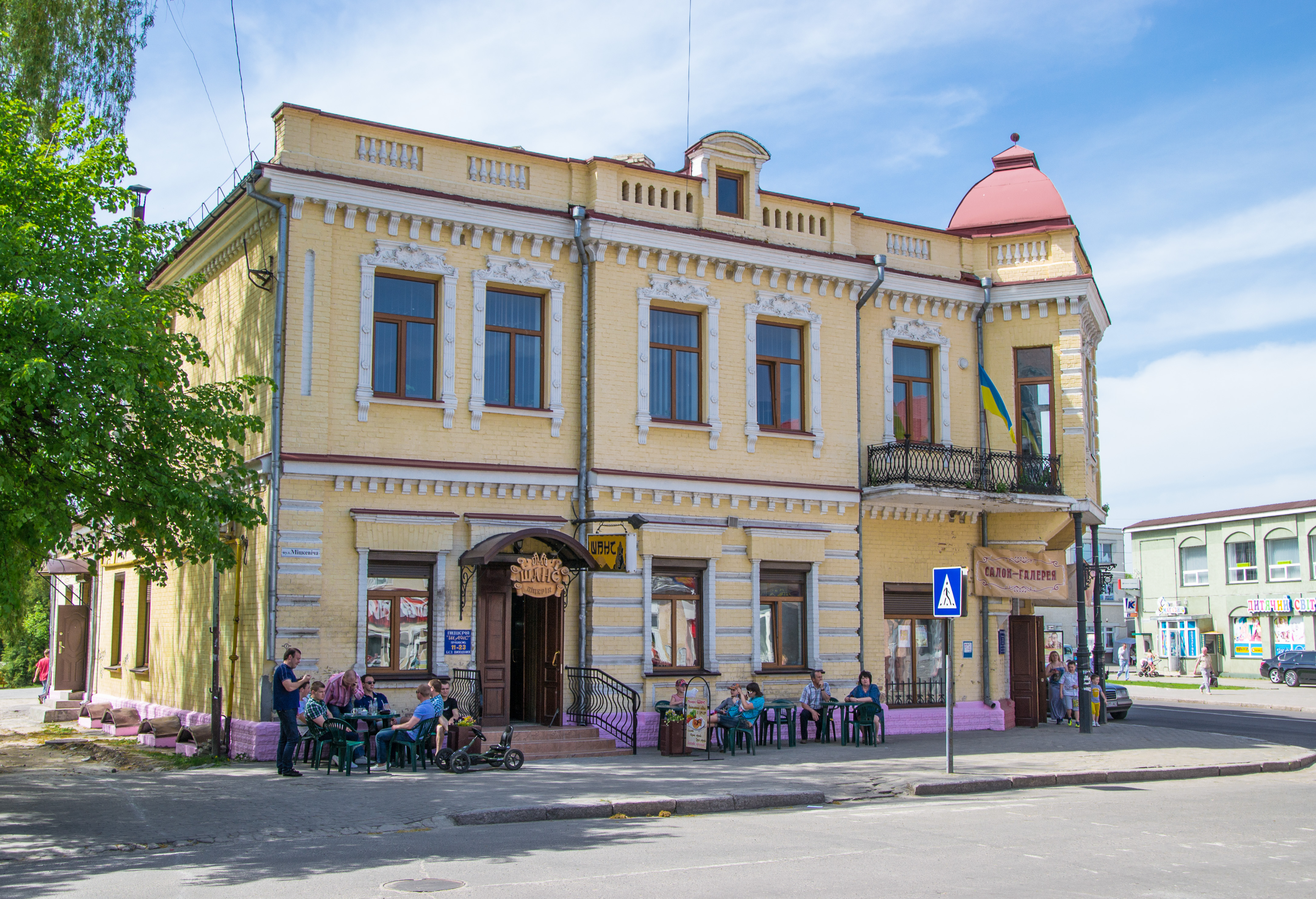 Житловий будинок (мур.), Ковель, вул. Незалежності, 89